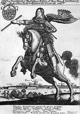 Christian Ludwig Fuerst von Lueneburg